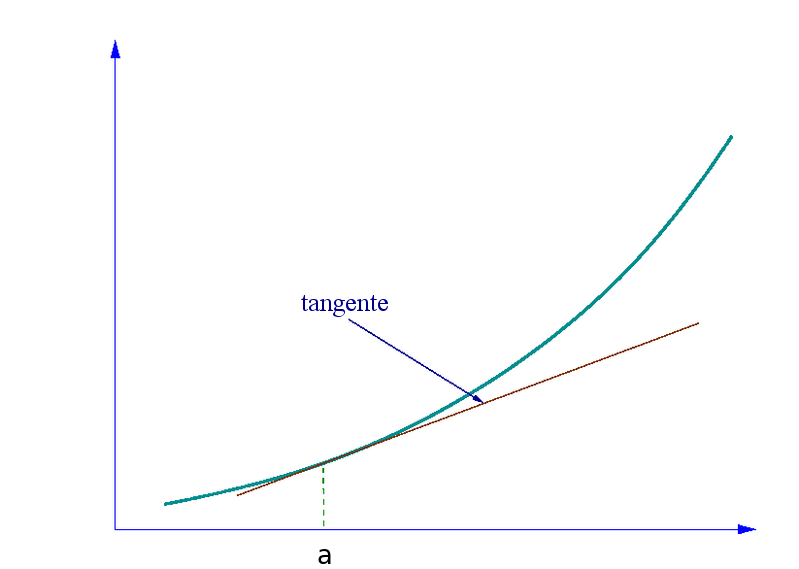 Image modifiée à partir de File:Tangent-calculus.png.